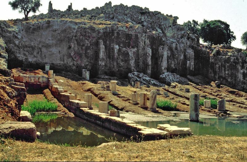 Antike Schiffswerft in Oiniadai (Griechenland)